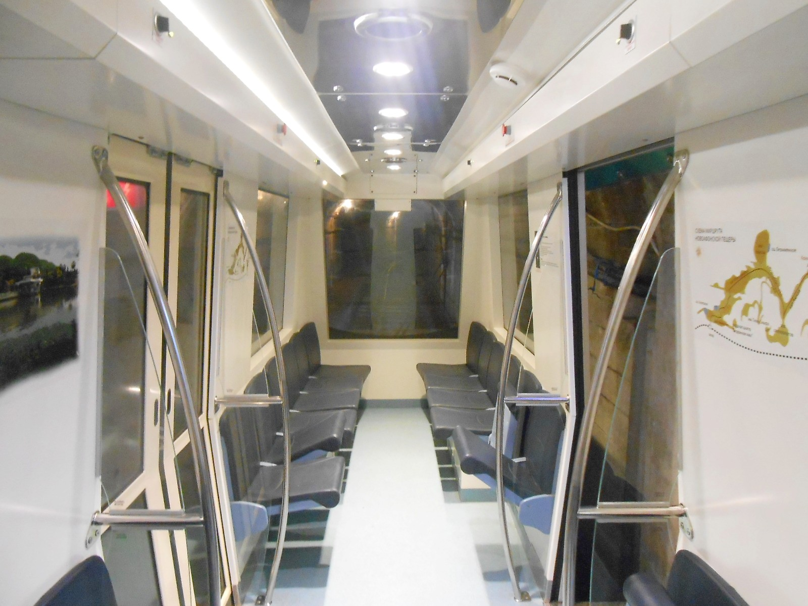 Салон головного вагона электропоезда ЭП-563